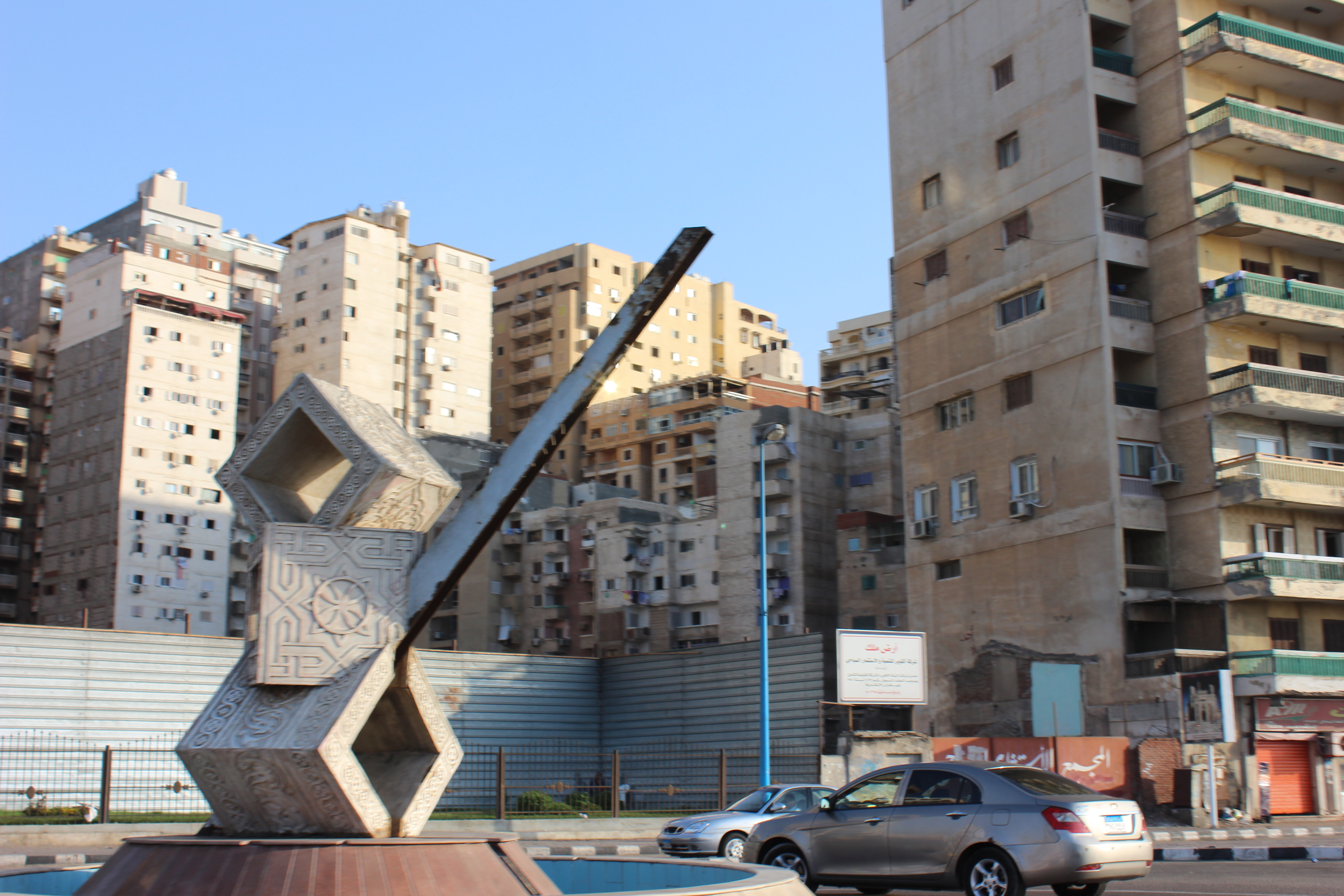 مباني الإسكندرية وبعض العلامات المميزة.